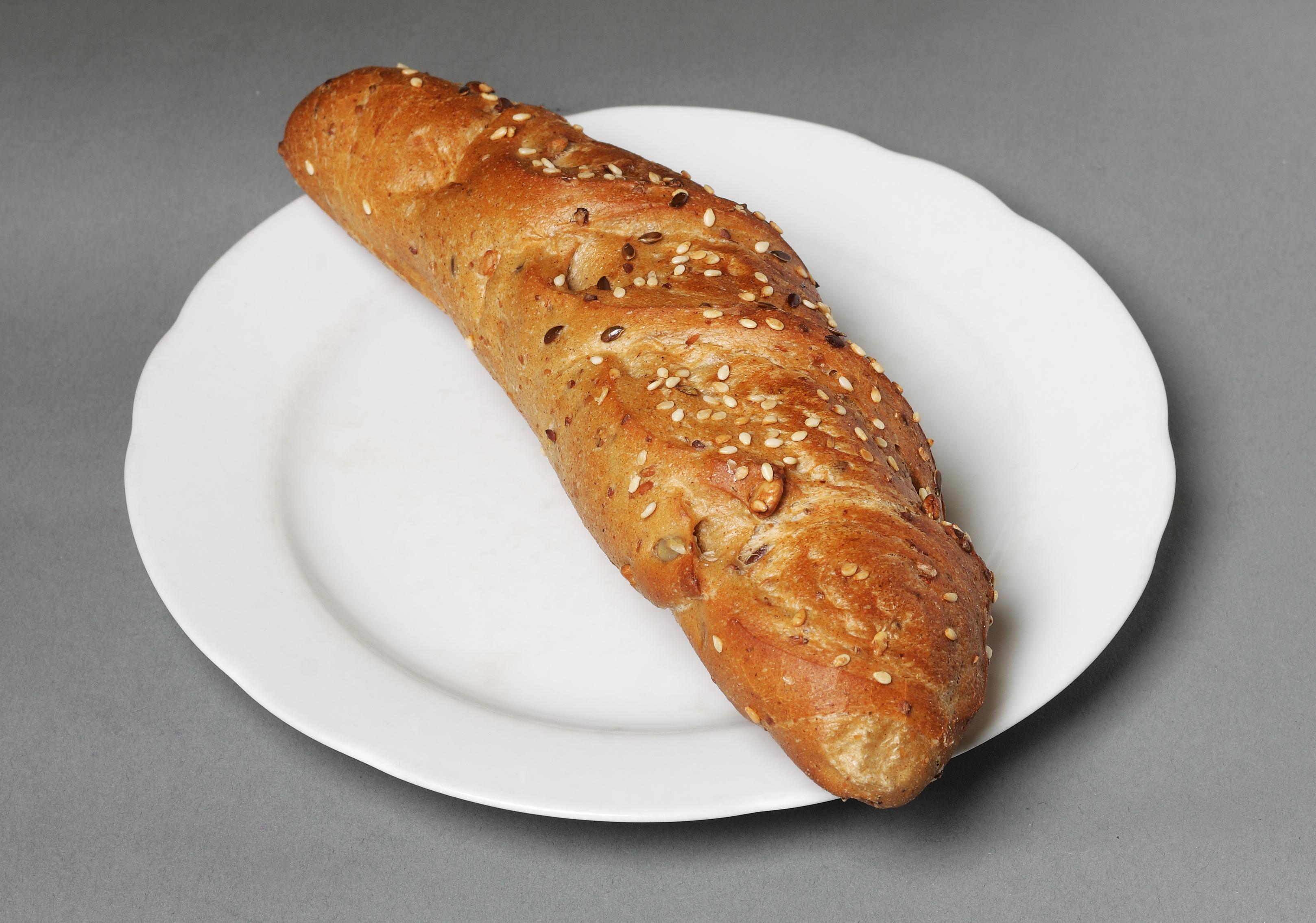 Ein Kornspitz aus einer Bäckerei in Oberösterreich auf einem Mehlspeisteller (Dessertteller).